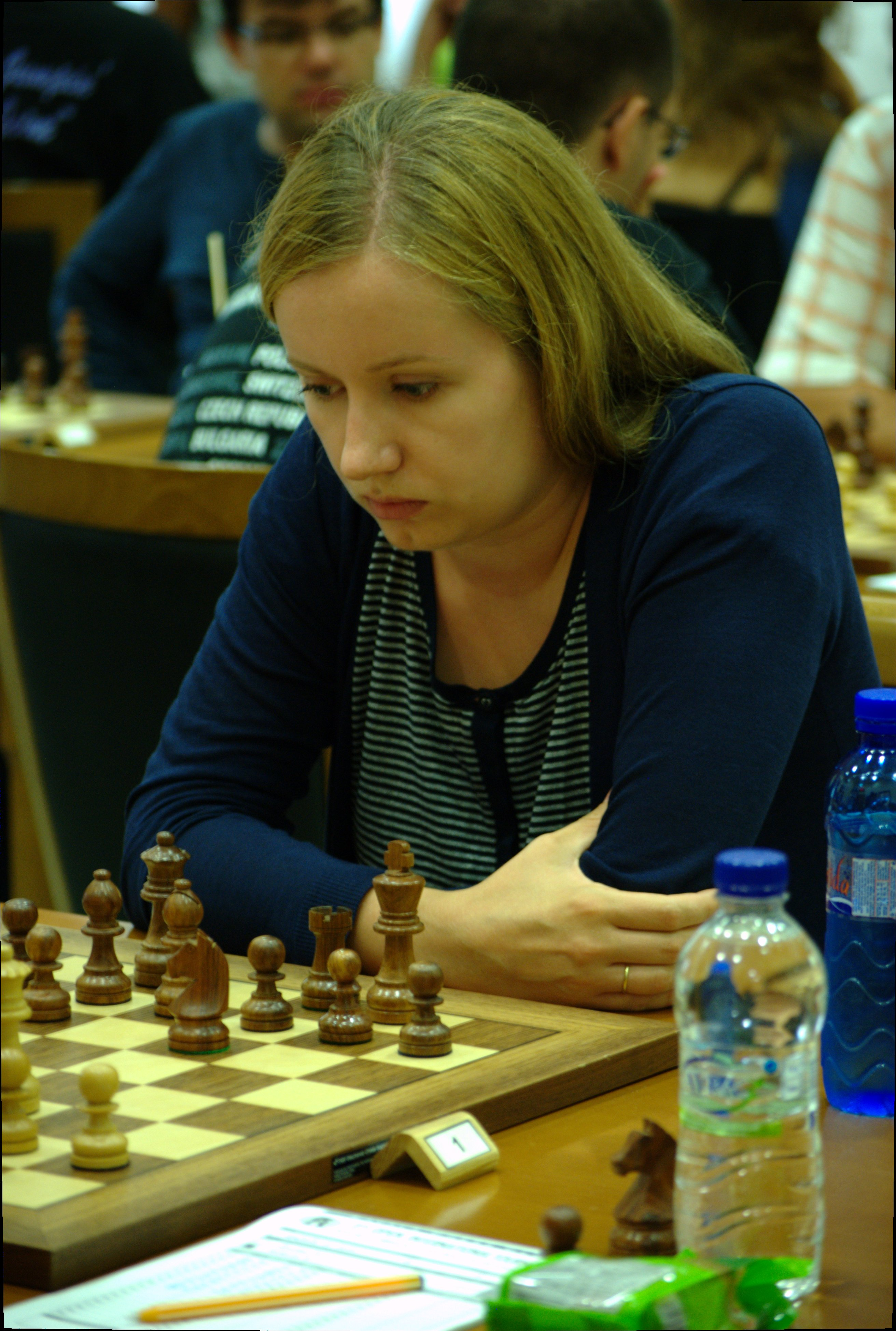 IM Ekaterina Atalik (Tukrey), Kavala Open 2011